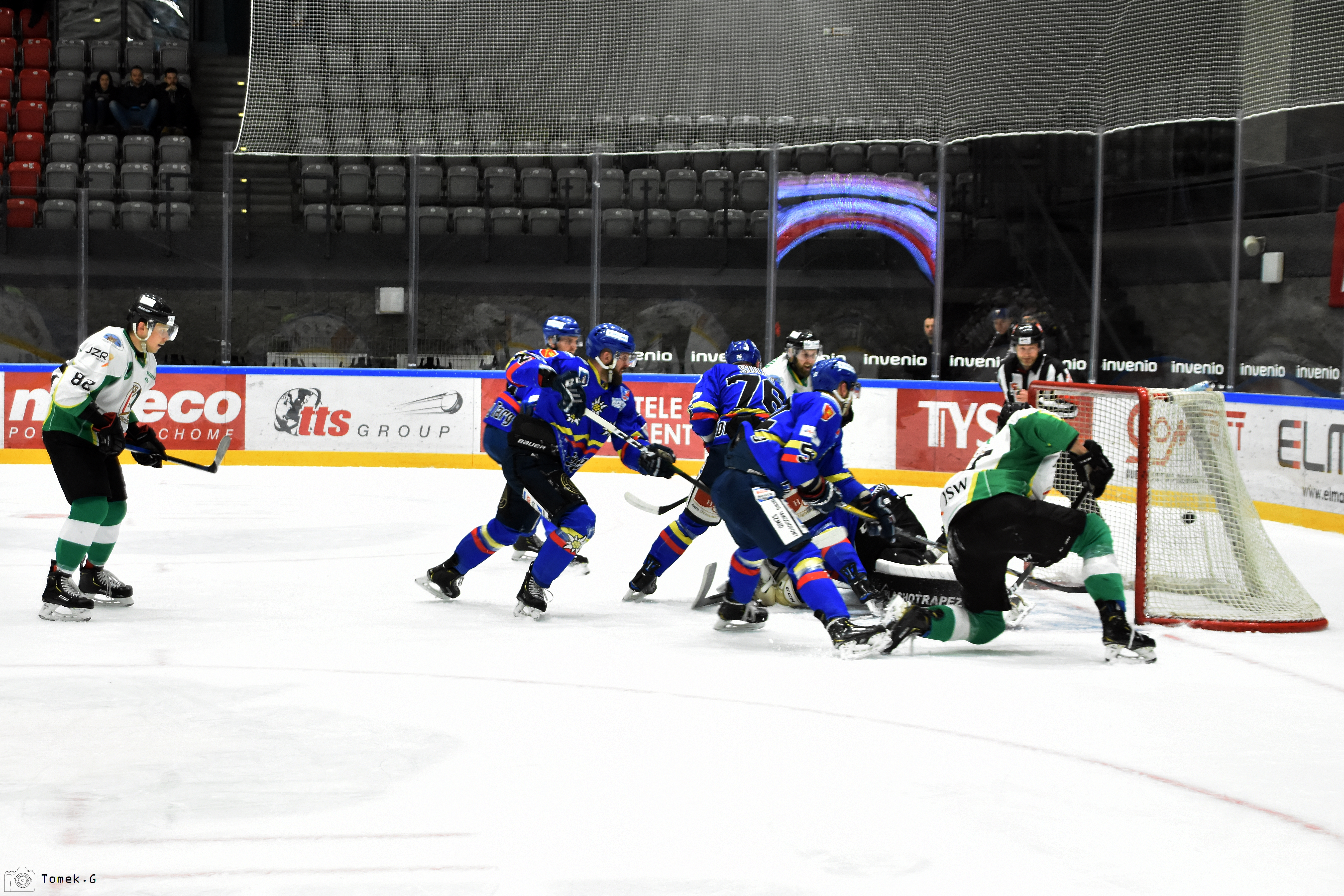 Puchar Polski w Hokeju na Lodzie 2019-2020 JKH Jastrzębie - Podhale Nowy Targ 1-3 2